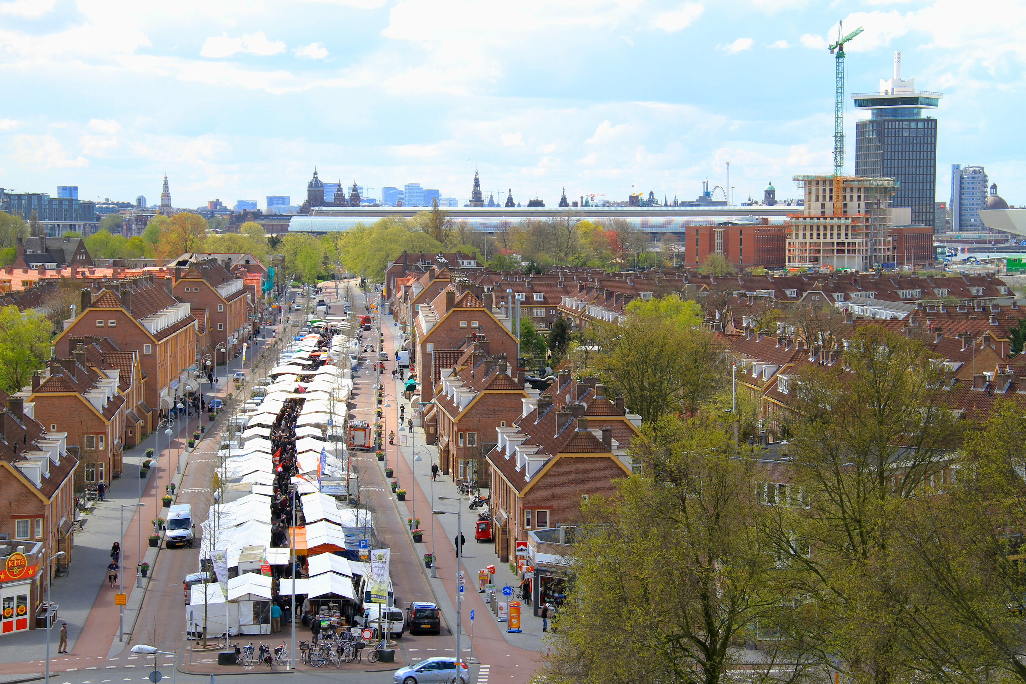 Van der Pekbuurt met markt, Amsterdam-Noord